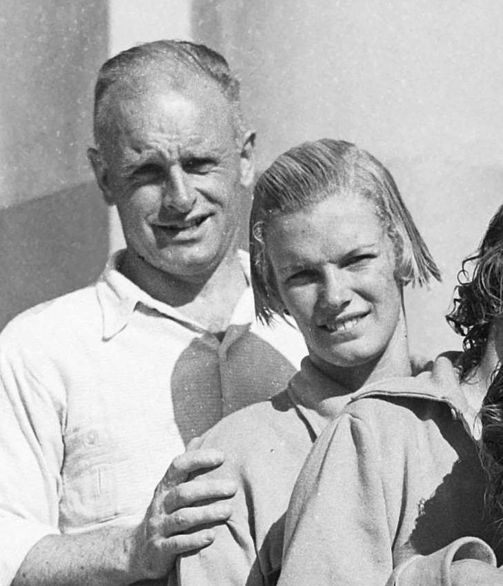 Europese zwemkampioenschappen te Monaco. Coach Jan Stender en Margot Marsman...